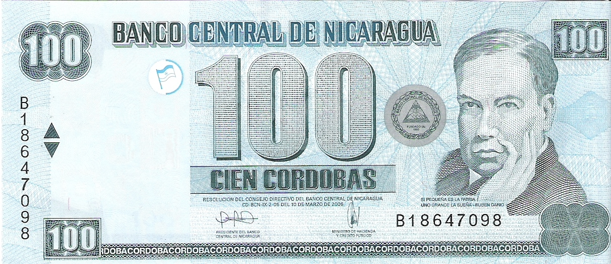 C$100 córdoba showing Rubén Darío